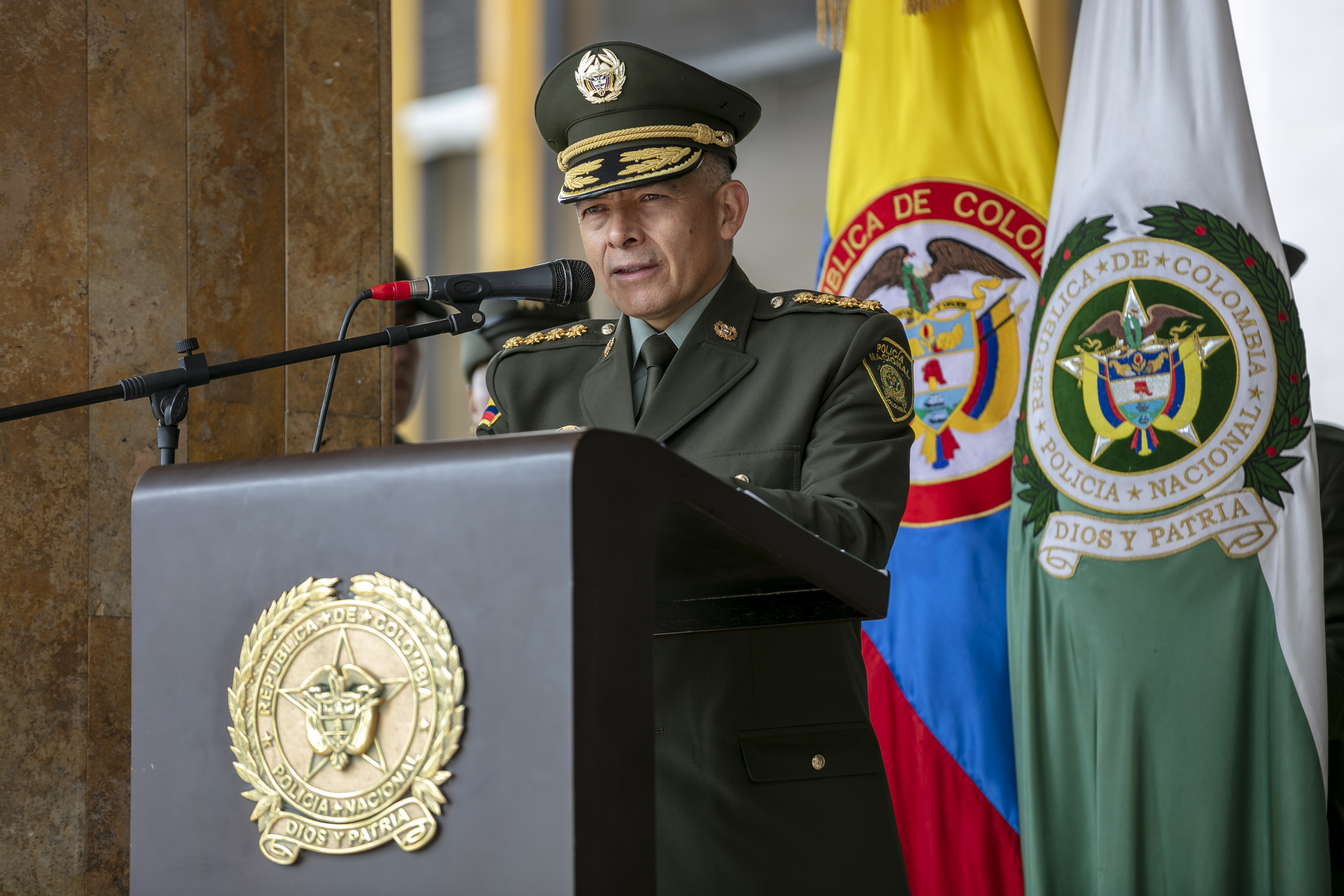 Mayor General Óscar Atehortúa Duque